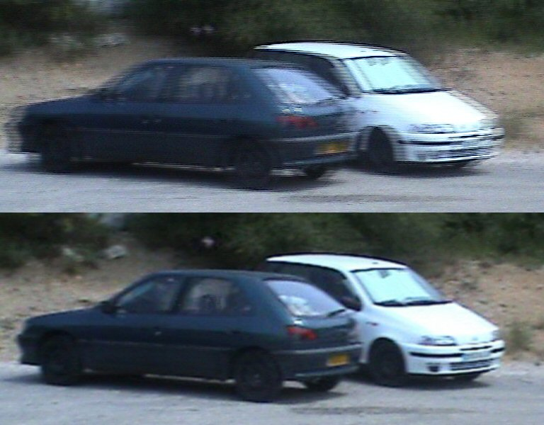 Différences d'aspect entre des images vidéo de formats entrelacé et progressif